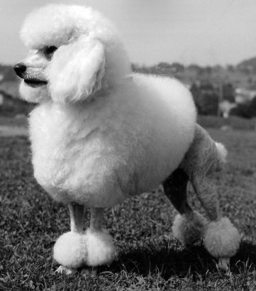 Caniche, Poodle, Pudel in Standardschur. Zuchtlinie Sirius; The breed linie Sirus is the breed standard. Die Löwenschur /engl.: Lions Clip wie sie bis in die 80ziger Jahre in Deutschland auf Hundeausstellungen noch gezeigt wurde.